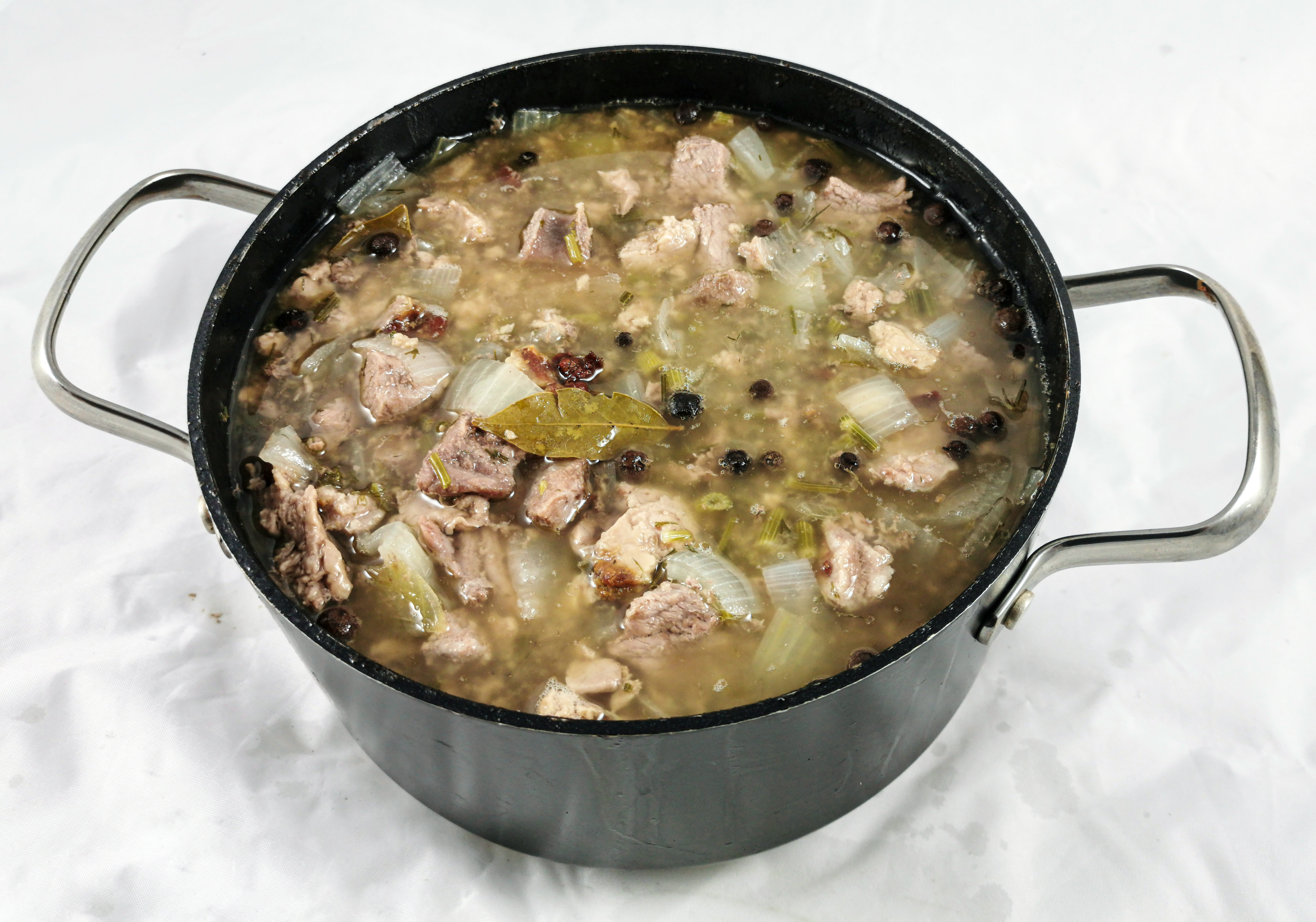 Karjalanpaisti